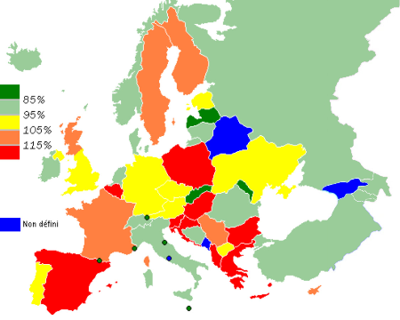 Population carcérale Europe